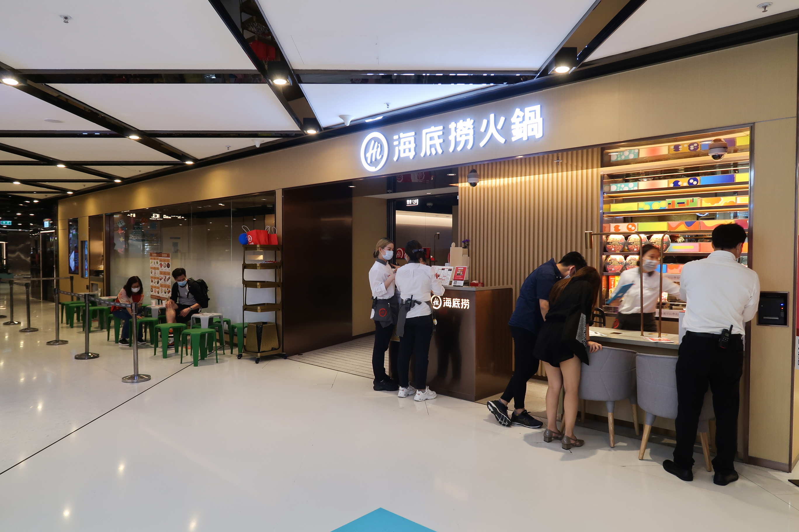 Haidilao Hot Pot in OP Mall, Hong Kong